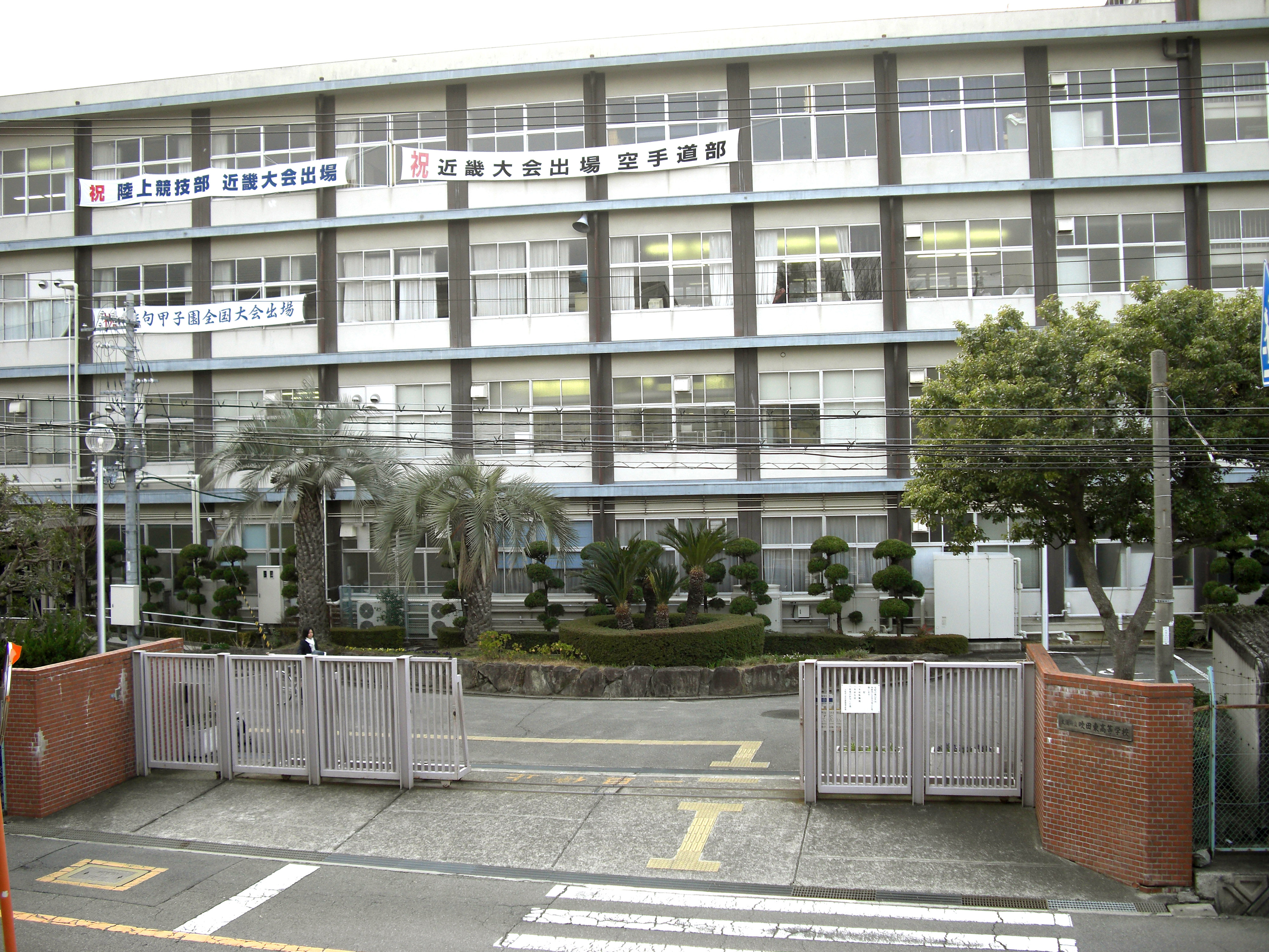 Suita Higashi High School,Aobaoka-minami Suita-shi Osaka Japan.